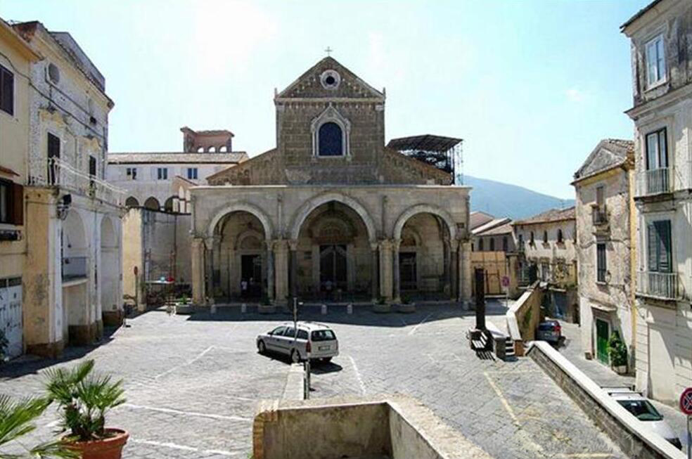 Sessa Aurunca - Duomo: Costruita nel 1103 è uno dei più significativi esempi di architettura romanica in Campania. Presenta un interessante connubio tra materiali di reimpiego provenienti da antichi edifici romani (Tempio di Mercurio e di Ercole, Teatro), caratteri dell’architettura romanica ed elementi del restauro barocco avvenuto intorno al 1758. La facciata, con frontone triangolare superiore e finestrone centrale, è preceduta da un portico del XIII secolo a tre arcate sorrette da pilastri e colonne. Sotto il porticato si aprono i tre portali di accesso alla chiesa decorati con architravi ed elementi marmorei di spoglio. La pianta è a croce latina, a tre navate divise da colonne di diversi materiali. Pregevole è il pavimento musivo del XII secolo nella navata centrale. Di grande valore artistico sono inoltre il candelabro per il cero pasquale ed il pulpito, opere del XIII secolo del maestro Peregrino da Sessa. Il candelabro ha base scolpita con figure a rilievo e inserti di mosaico; il pulpito decorato da mosaico e bassorilievi è a struttura rettangolare, sorretta da sei colonnine che poggiano su leoni di marmo. Nella cappella del Sacramento, da ammirare è la Comunione degli Apostoli di Luca Giordano.